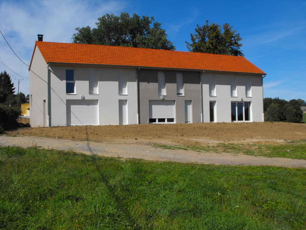 Construction de trois logements neufs par OPHIS